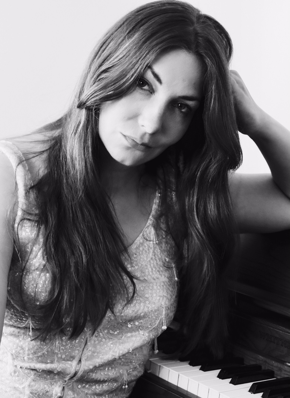 PersonamKlavier